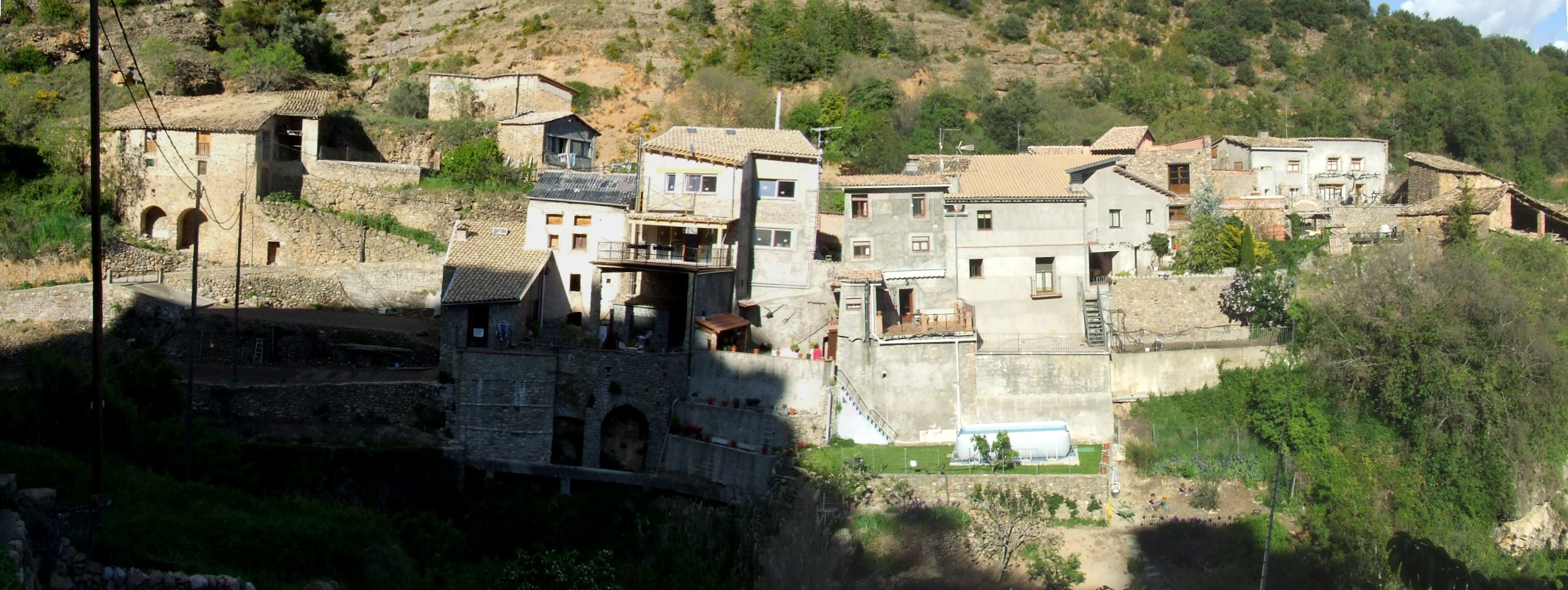 Panoràmica de lo Barri de Rivert (Toralla i Serradell, Conca de Dalt)